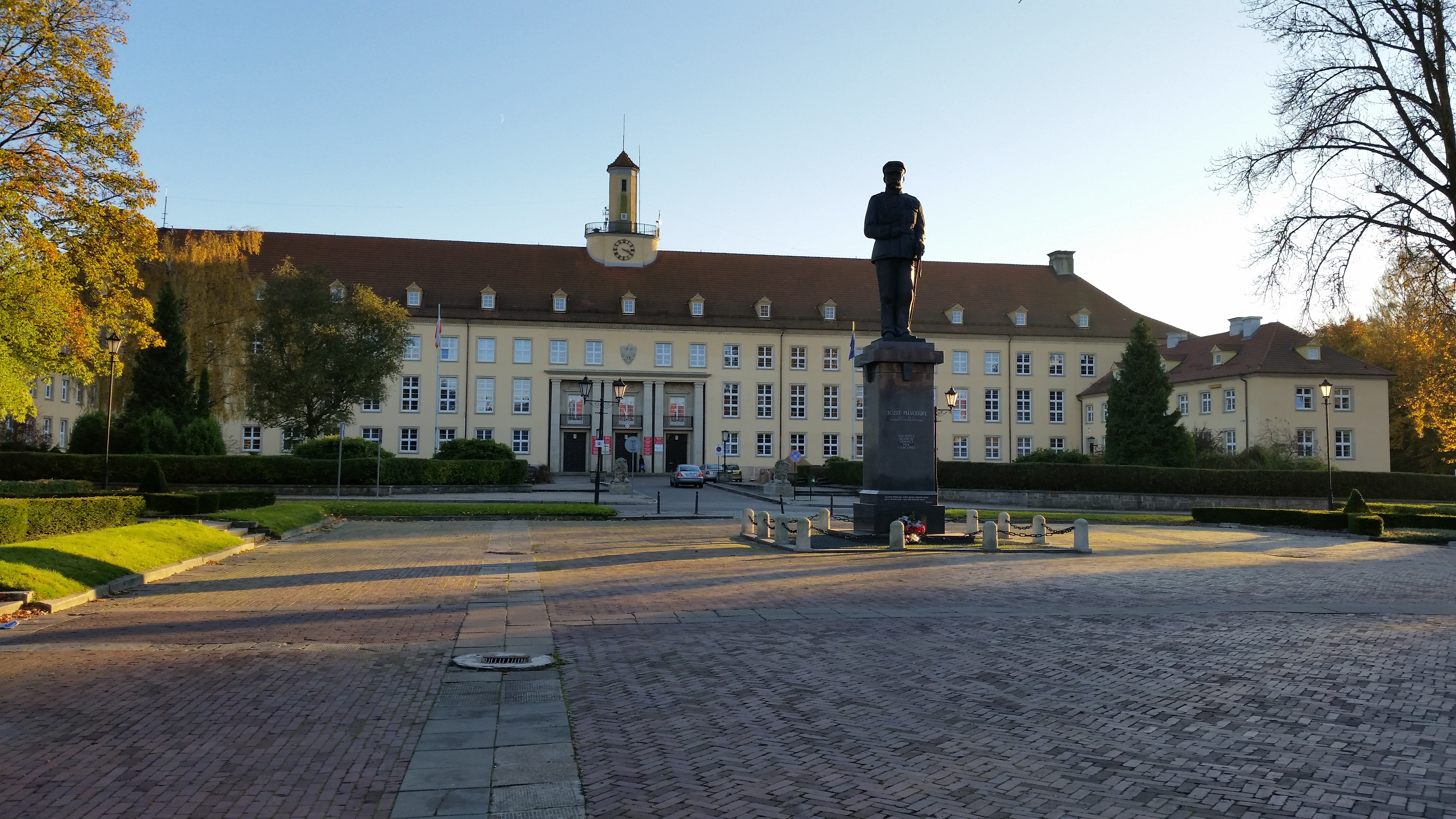 Plac Zwycięstwa w Koszalinie - pomnik marsz. Józefa Piłsudskiego, w tle gmach Delegatury Zachodniopomorskiego Urzędu Wojewódzkiego